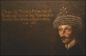 Vlad Ţepeş